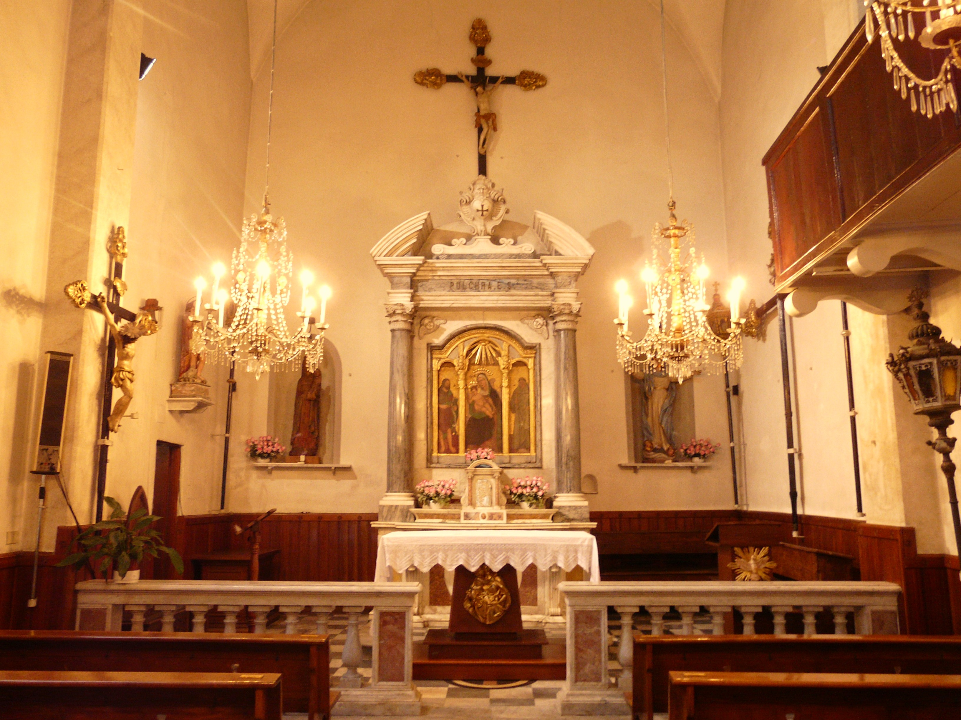 Interno dell'Oratorio di Santa Maria Assunta o dei Disciplinanti, Riomaggiore, Cinque Terre, La Spezia, Liguria, Italia